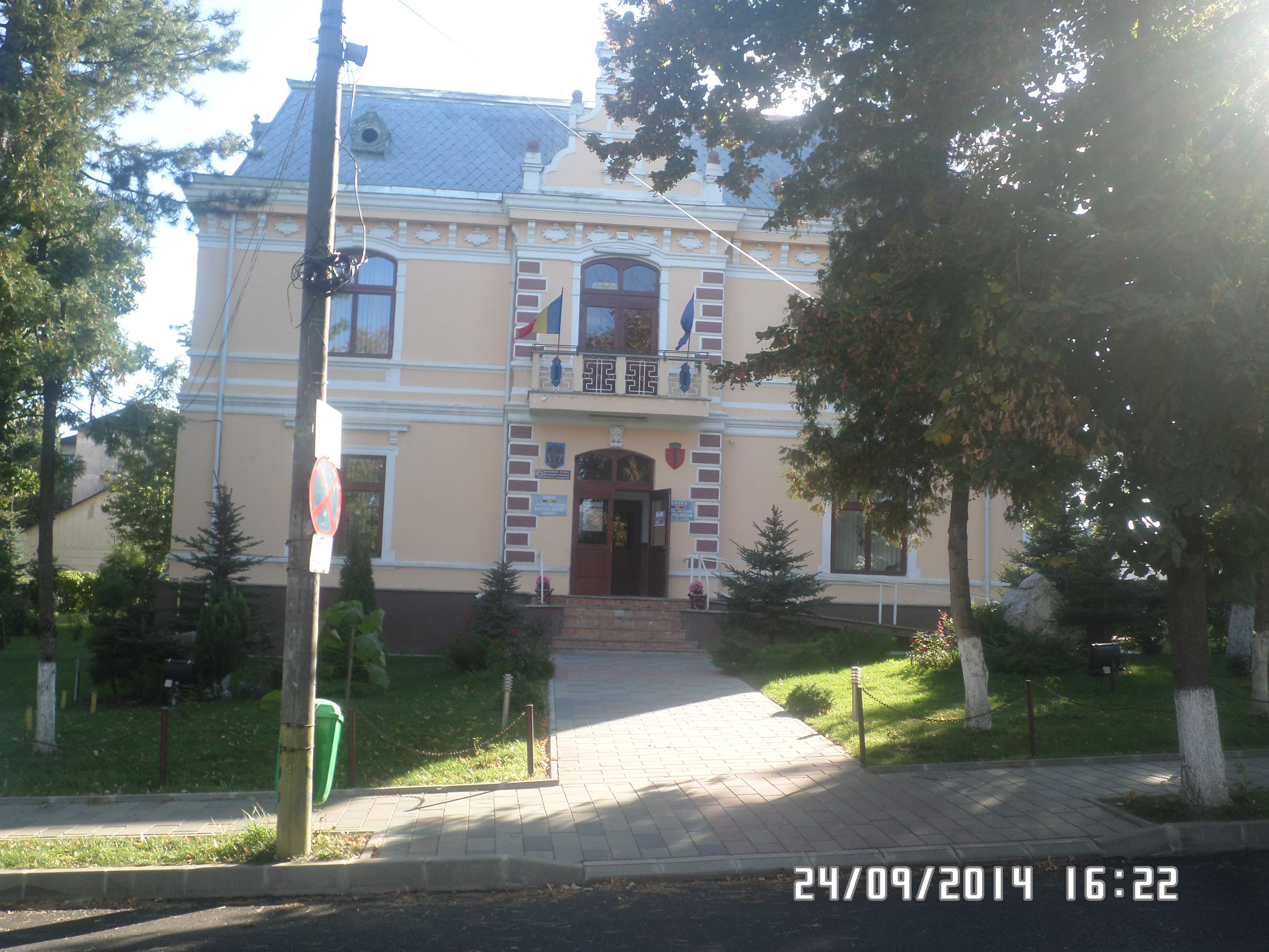 Printre cele mai vechi instituții culturale dorohoiene, care au desfașurat o activitate susținuta de răspândire a cunoștințelor cultural-științifice în rândul cetățenilor orașului, se numără și prima bibliotecă publică, atestată documentar în 28 aprilie 1870.